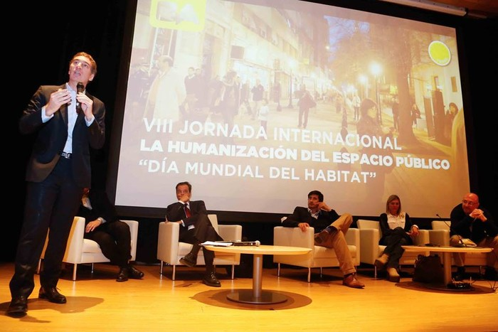 VIII Jornada Internacional La Humanización del Espacio Público, “Día Mundial del Hábitat”, realizada en Buenos Aires.